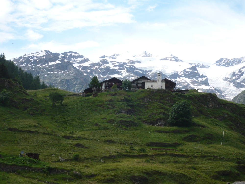 Monte Rosa Massiv von Gressoney-La-Trinité aus gesehen